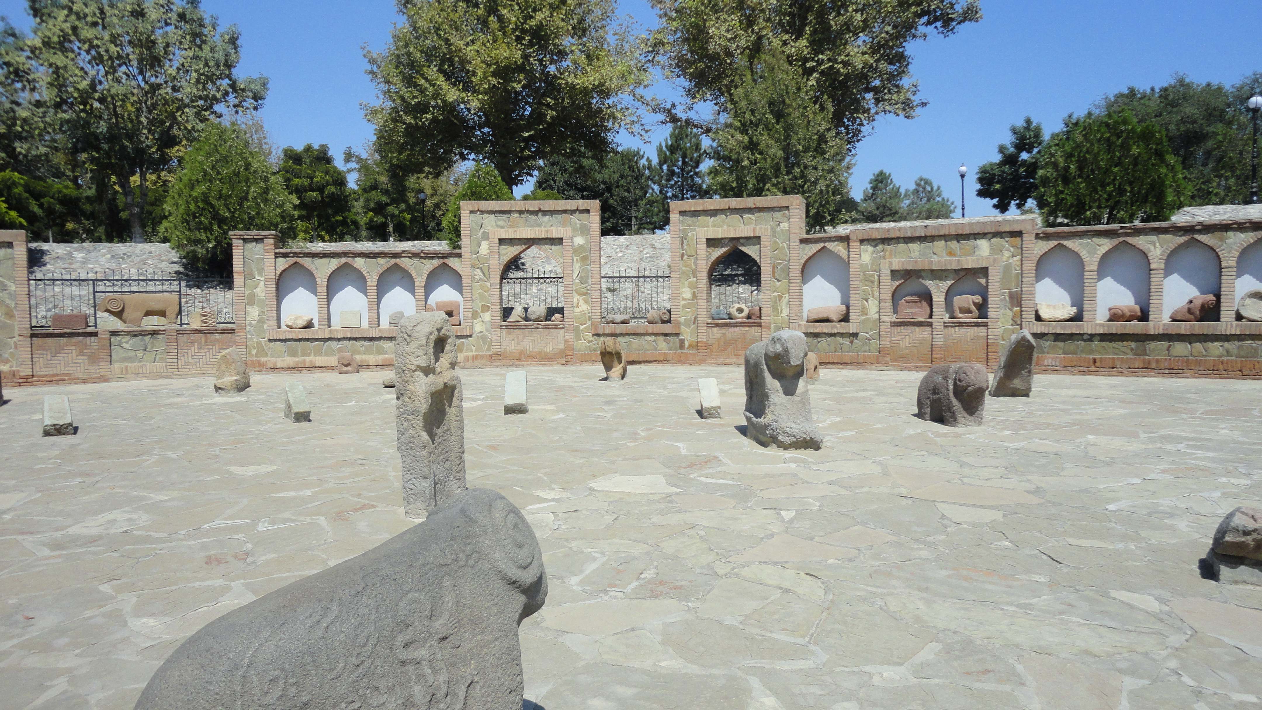 Açıq səma altında muzey. Möminə Xatun türbəsinin yanında